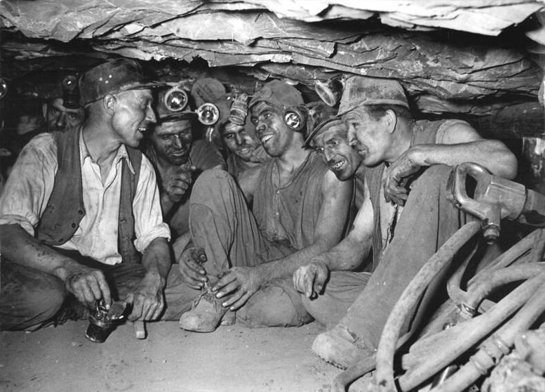 Bergarbeiter, Arbeitsbesprechung Zentralbild Krueger 3.11.1952 Erste Komplexbrigade in der Kupfererzgewinnung(Mansfeldkombinat "Wilhelm Pieck). Am 1.November 1952 fuhr die erste Komplexbrigade in der Kupfergewinnung, die Brigade "XIX.Parteitag" im Otto-Brosowski-Schacht des Mausfeldkombinats "Wilhelm Pieck" als Auftakt zum Monat der Deutsch-Sowjetischen Freundschaft ihre erste Schicht und erreichte eine Planerfüllung von 11, 7%.Nach Beendigung der Schicht fand eine kurze Feierstunde statt, in der Komplexbrigadier Adolf Taraba und der stellvertretende Werkleiter Stenzel den Komplexbrigadevertrag unterschrieben.Die Komplexbrigade "XIX.Parteitag", die auf Initiative des Komplexsteigers Otto Sonnabend gebildet wurde, setzt sich aus den bisherigen Brigaden des Flügels 5-II, einschließlich der Schiesser, Handwerker und Förderleute zusammen.UBz: Mitglieder der Komplexbrigade "XIX.Parteitag" vor Streb nach der ersten Schicht.(vlnr) Steiger und Initiatior der Brigade Otto Sonnabend;Otto Lieske; Kurt Sommer; Ottmar Mäntel und Komplexbrigadier Adolf Taraba.